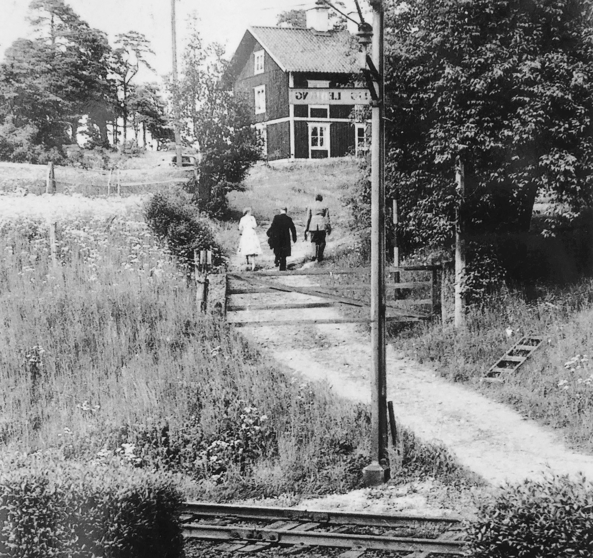 Överjärva statarlänga med järnvägsspåret i förgrunden